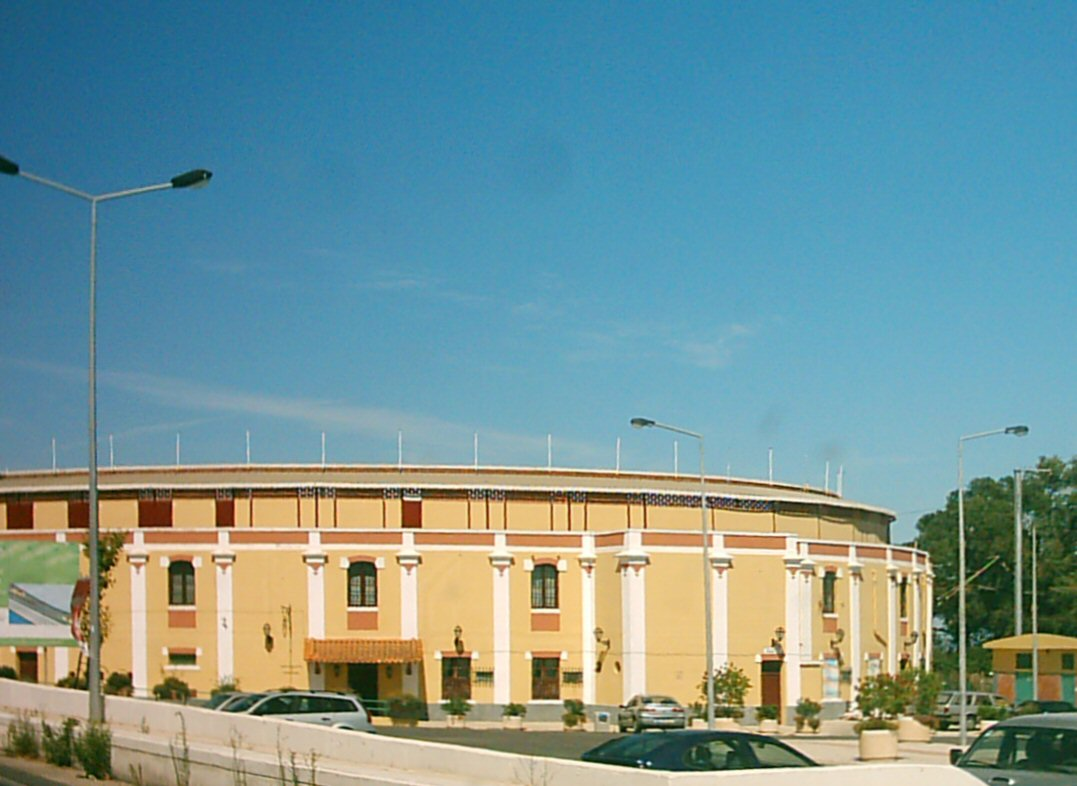 Praça de touros de Vila Franca de Xira Source: self